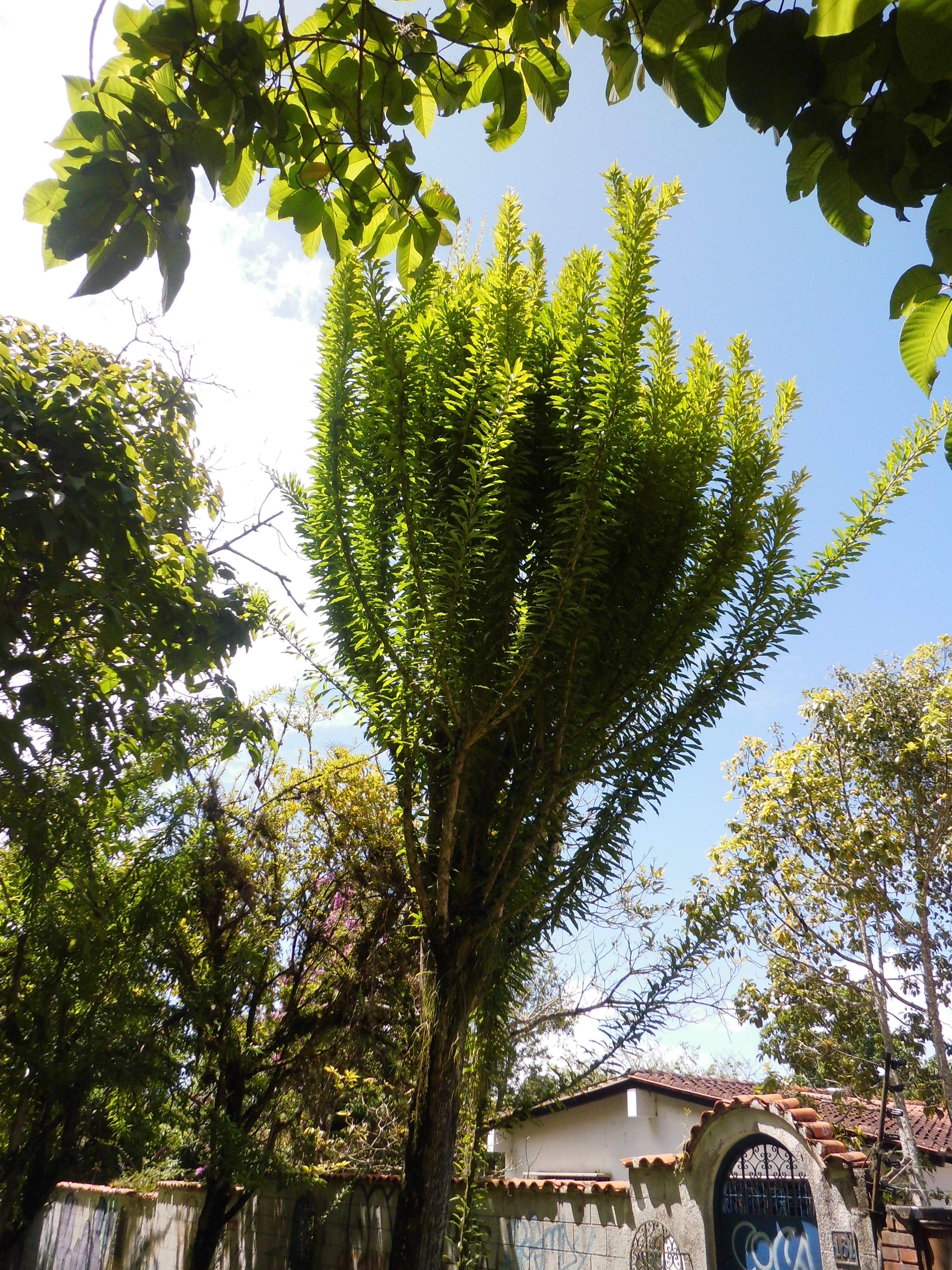 Crescentia cujete Linnaeus La Lagunita, municipio El Hatillo, estado Miranda - Venezuela.